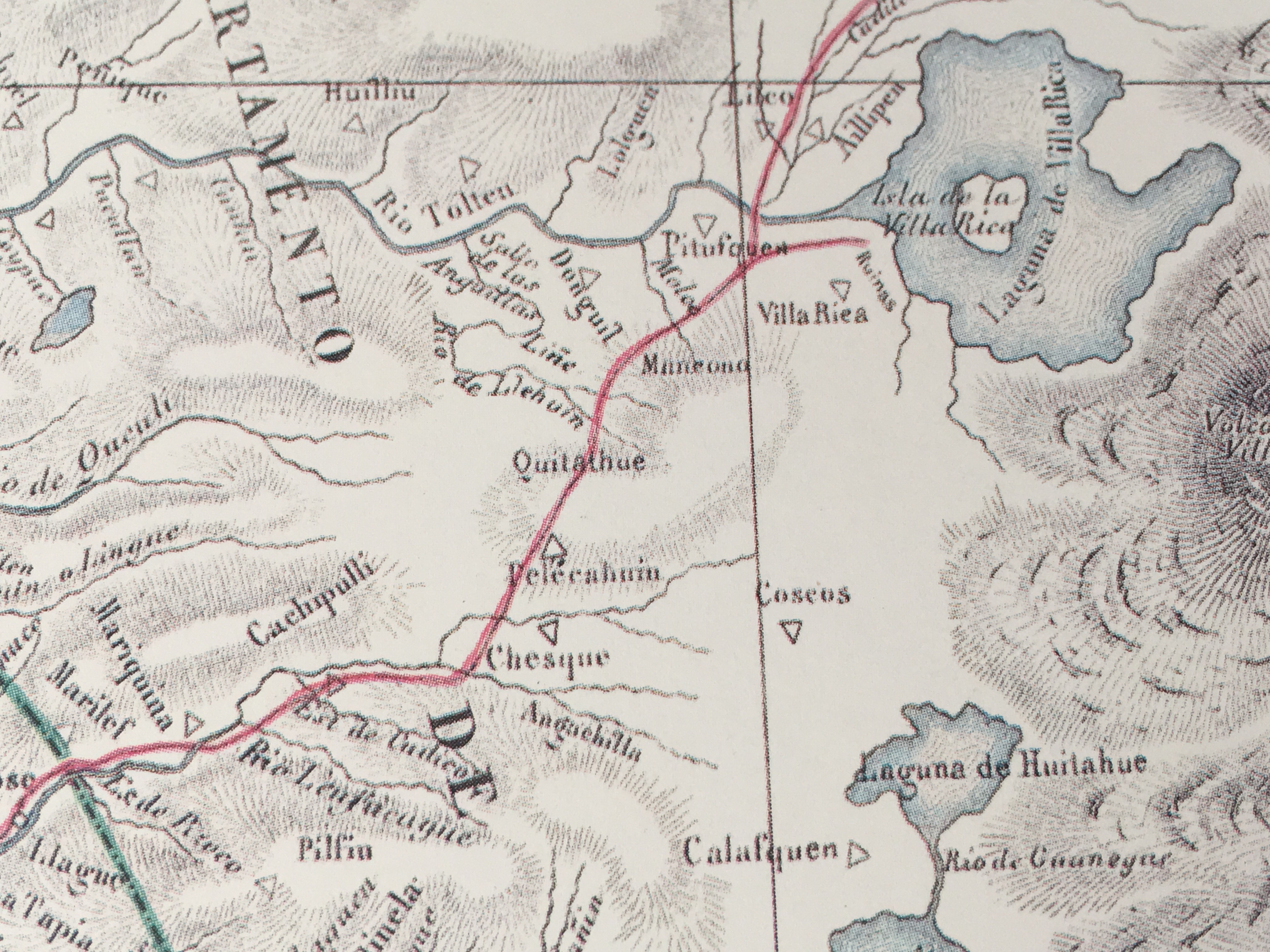 Atlas de la Historia Física y Política de Chile, Tomo Primero. Claudio Gay (1854)